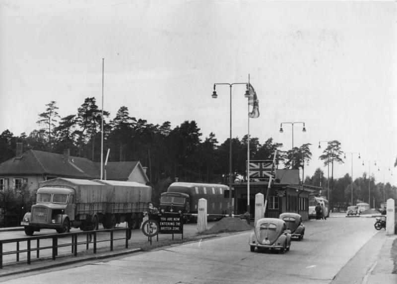 Marienborn, Grenzkontrollpunkt Zentralbild/Junge 28.7.1954 Hochbetrieb am Autobahngrenzkontrollpunkt Trotz der Spaltung unseres Vaterlandes verstärkt sich immer mehr der Verkehr vom Osten nach dem Westen und vom Westen nach dem Osten Deutschlands. Das sieht man am Kontrollpunkt in Marienborn. UBz.: Am Kontrollpunkt Marienborn.